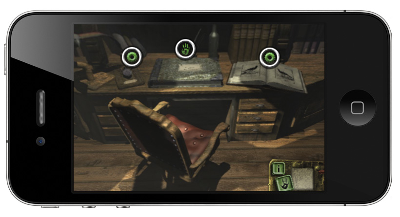 Capture d'écran du jeu vidéo L'Amerzone (version iPhone), développé et édité par Anuman Interactive.